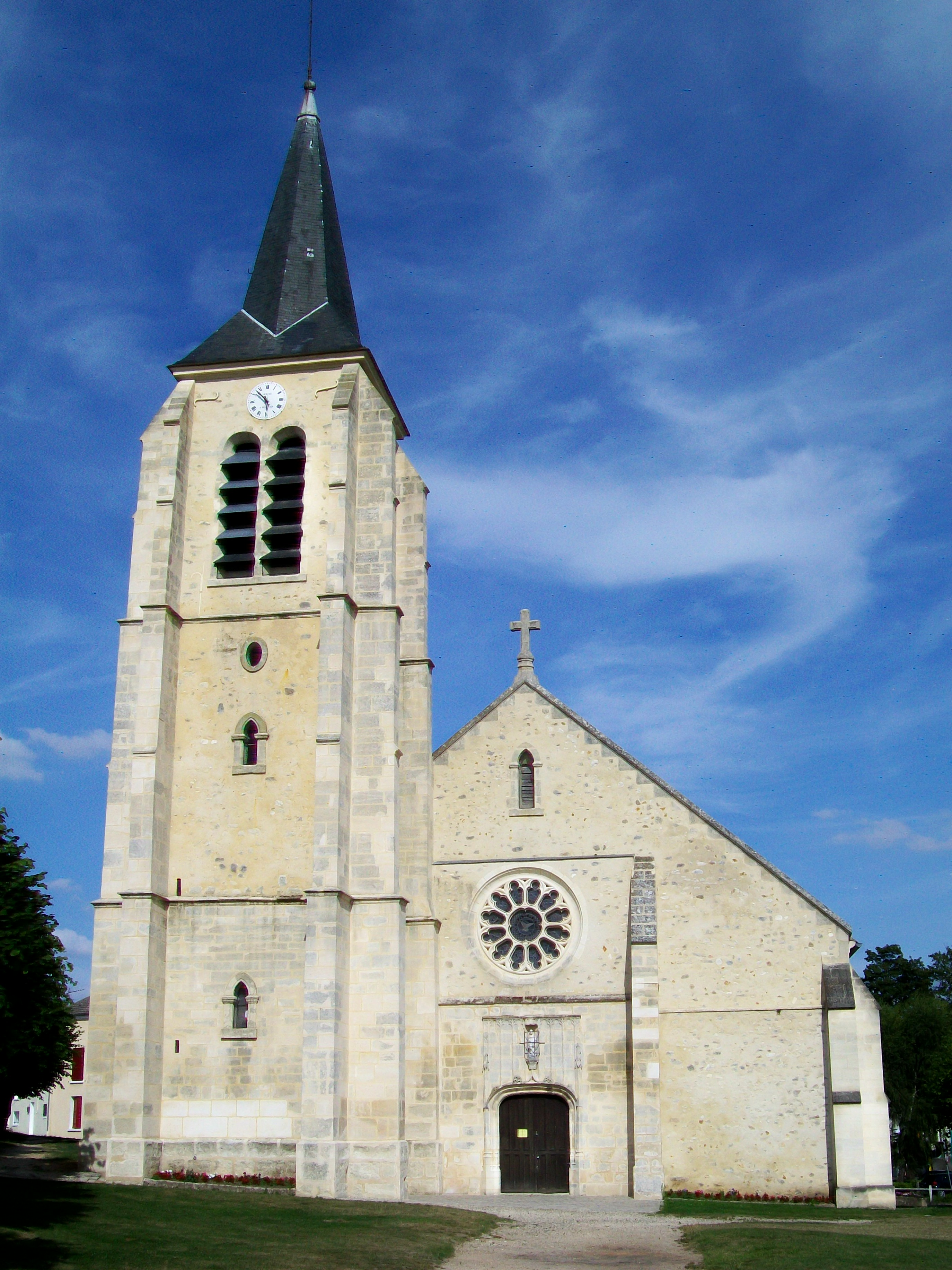 L'église Saint-Pierre-et-Saint-Paul des XVIe et XVIIe siècles ; façade ouest.